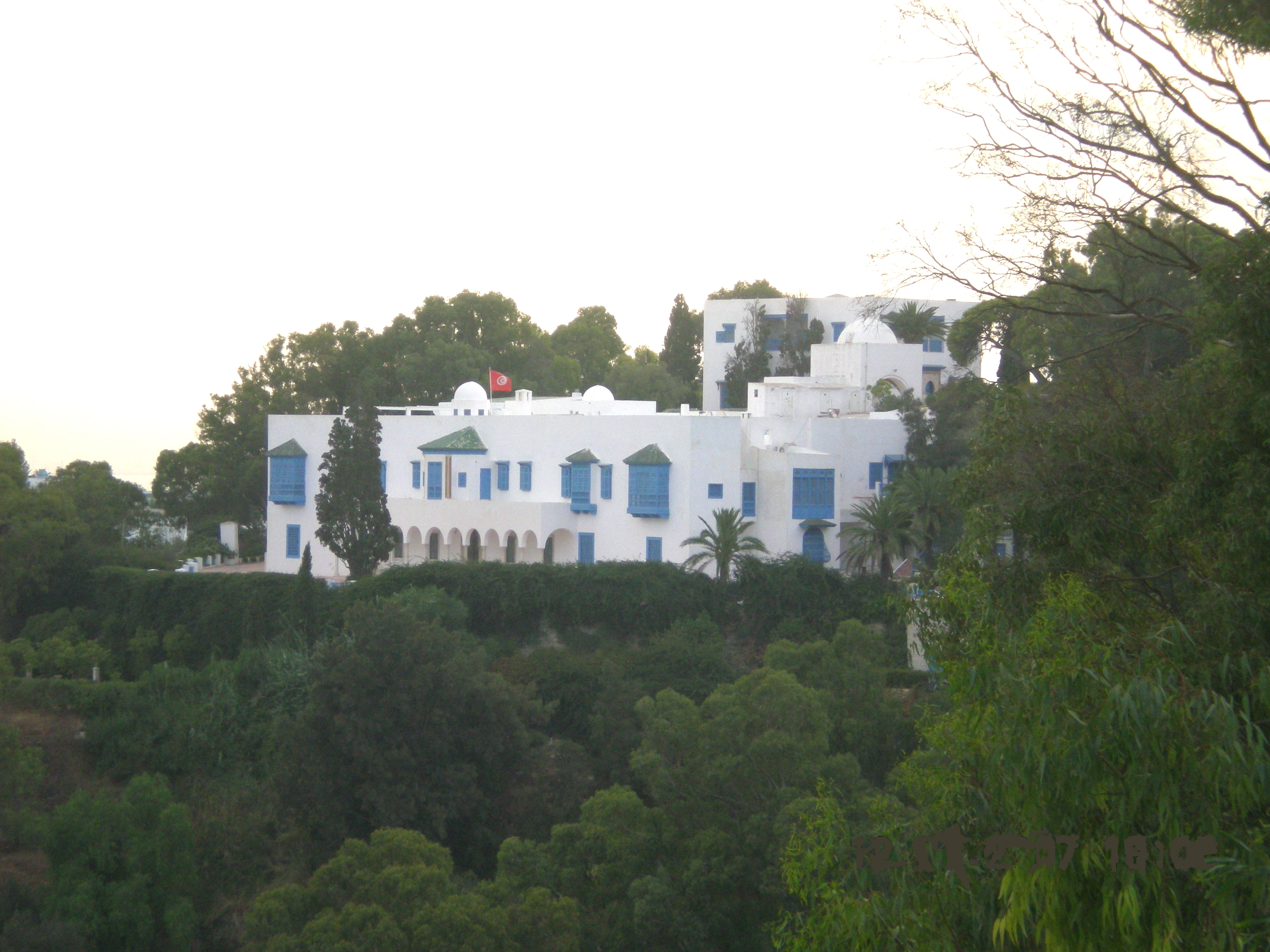 Baron Erlanger's House, Sidi Bou Said, Tunisia